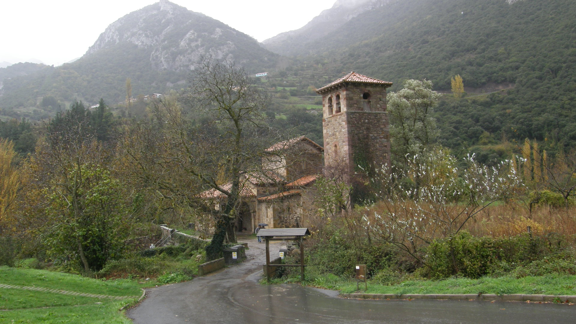 Santa María de Lebeña, provincia de Santander.